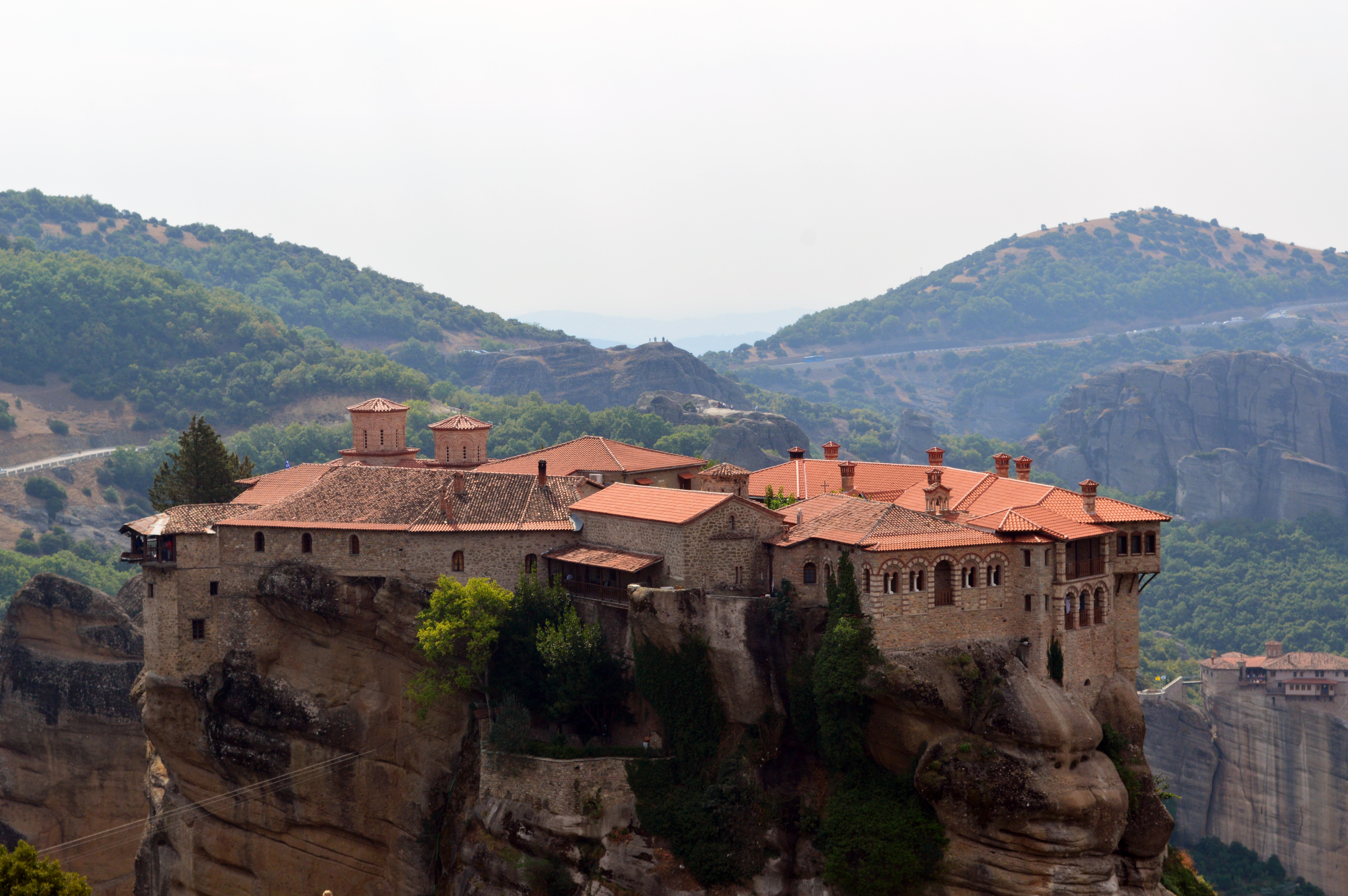 «Μονή Βαρλαάμ»